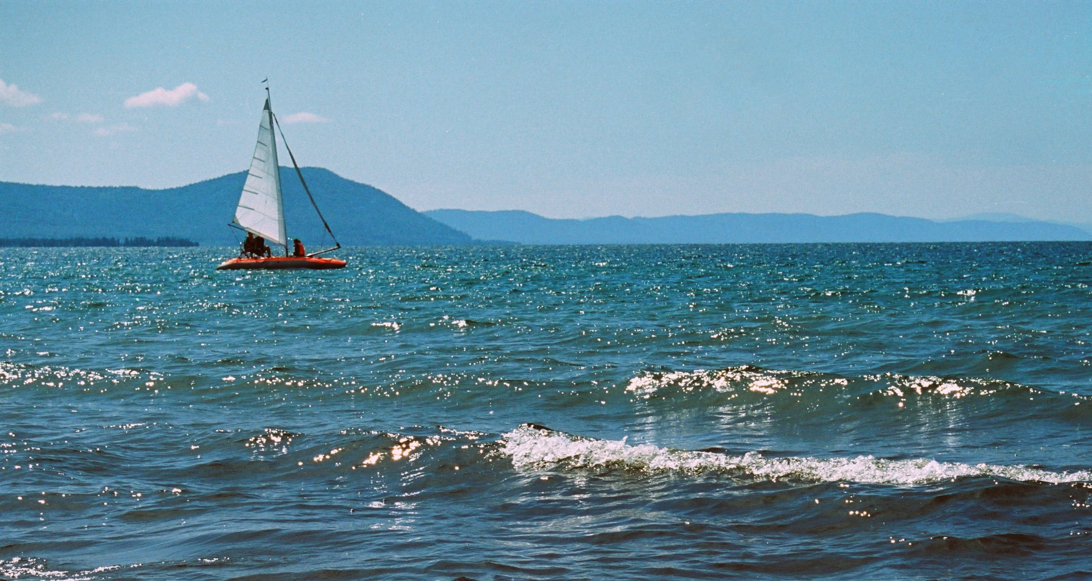 Безымянная - бухта на восточном берегу озера Байкал. Бурятия. Сибирь